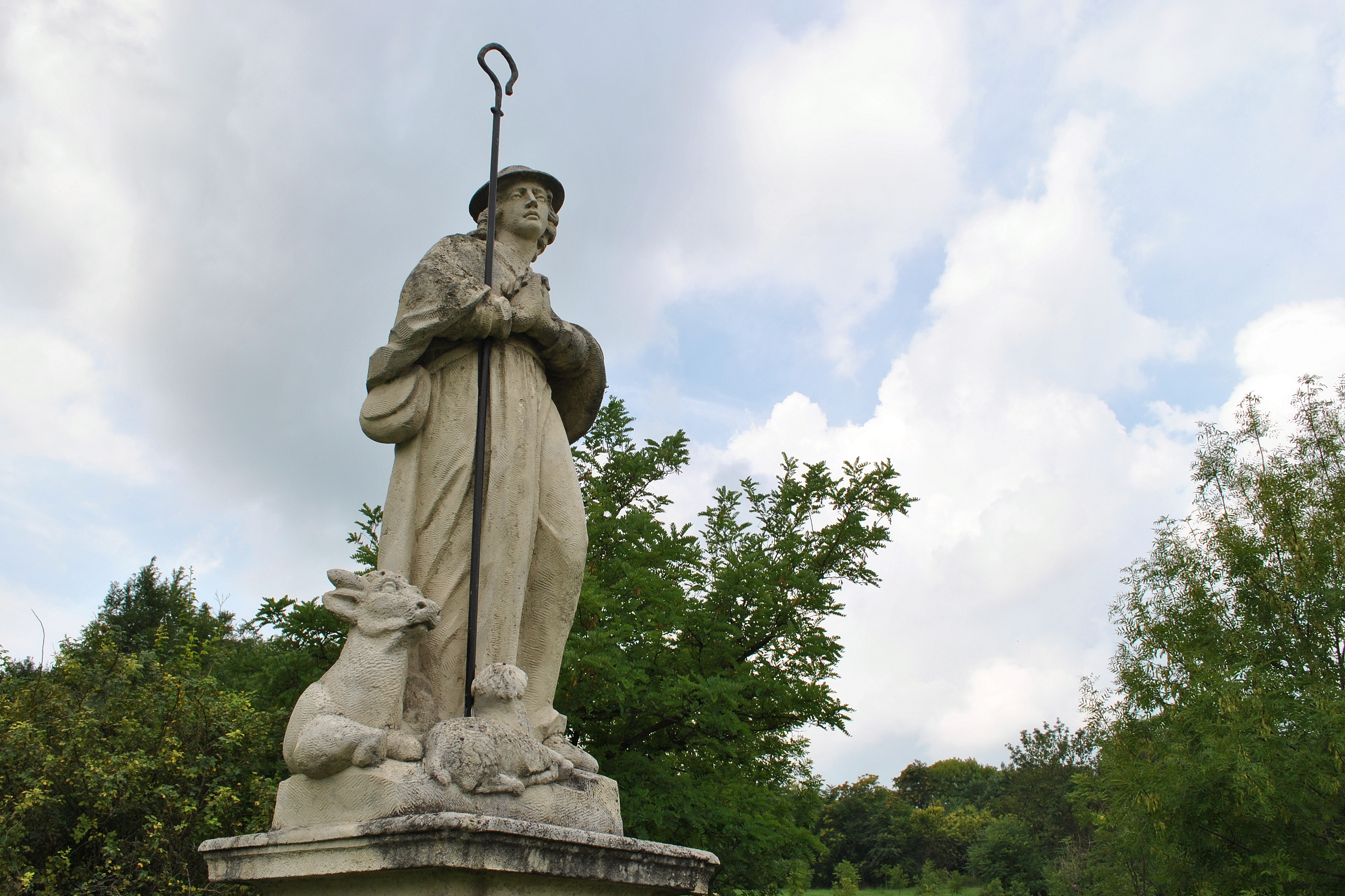 Szent Vendel-szobor (Etyek, Kálvária domb) This is a photo of a monument in Hungary. Identifier: 13232